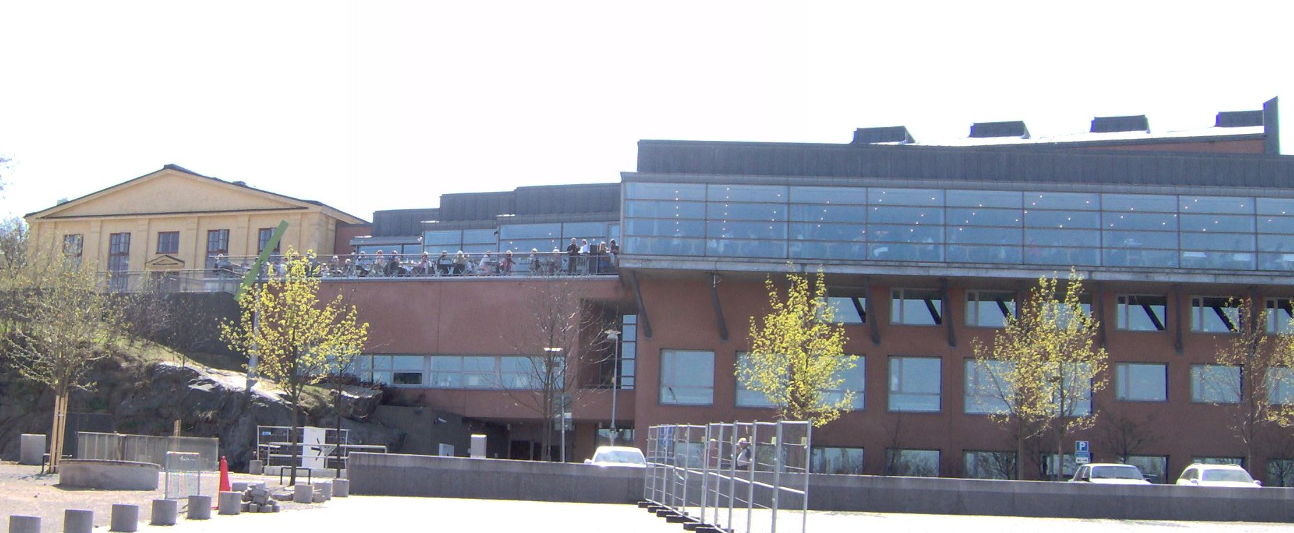 Moderna museets inne- och uteservering och Arkitekturmuseum på Skeppsholmem i Stockholm från sjösidan. Restaurants at Modern Art Museum and Architexture Museum on Ships island in Stockholm, Sweden from the seaside.